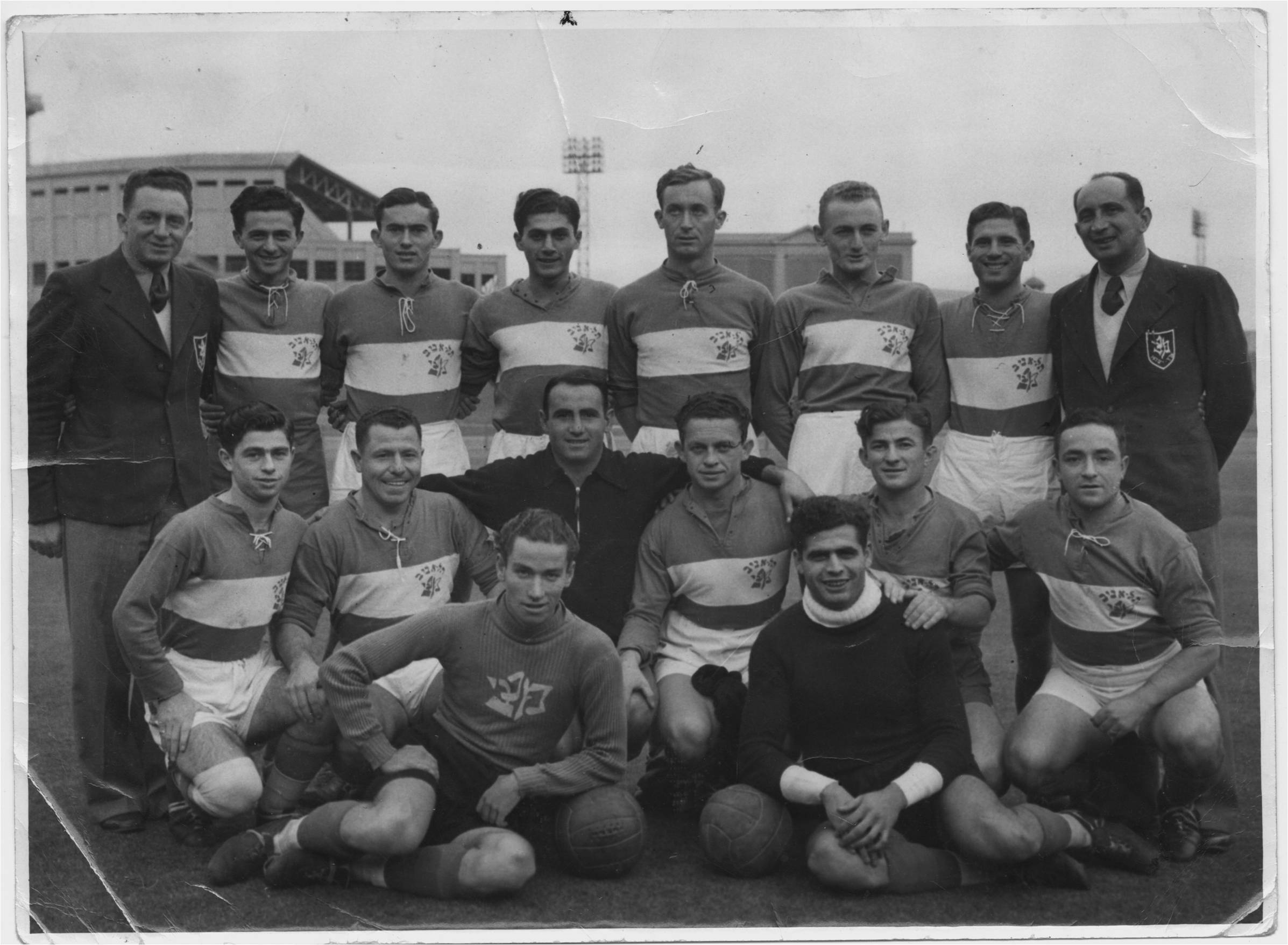 באצטדיון קריקט גראנד סידני לפני המשחק נגד נבחרת אוסטרליה , מכבי ניצחה 2:1 (שער הניצחון נכבש ע"י מילה גינזבורג ) 1/7/1939 עומדים מימין לשמאל : פולק אגון – מאמן , מכליס גאול , סינקה וינר , נויפלד פרי , שנידרוביץ אברהם (מכבי נס ציונה ), פוקס צבי , גינזבורג מילה , שלמה ארזי – מנהל המשלחת . יושבים מימין לשמאל : ליברמן יוסף , בית הלוי ג'רי , דוקטור (הפועל ת"א ) ,מירימוביץ מנחם , רזניק אברהם (הקפטן ) אלמביק . יושבים בשורה ראשונה משמאל לימין : מזרחי בנימין , סידי יוסף